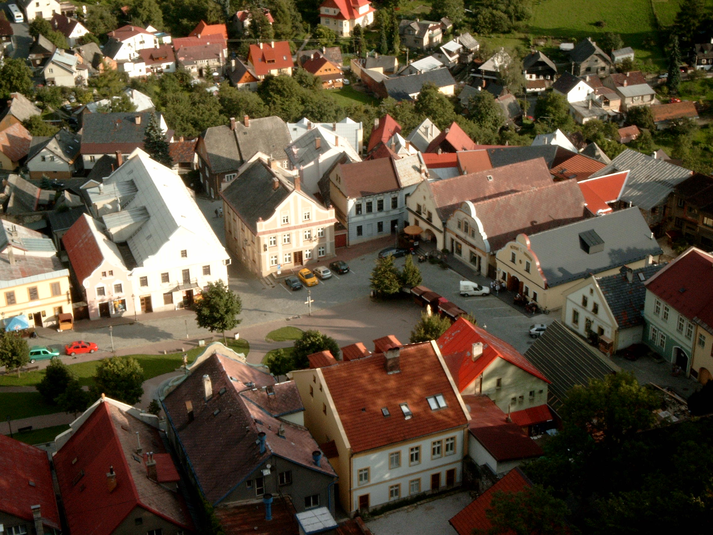 Štramberk, Czech Republic